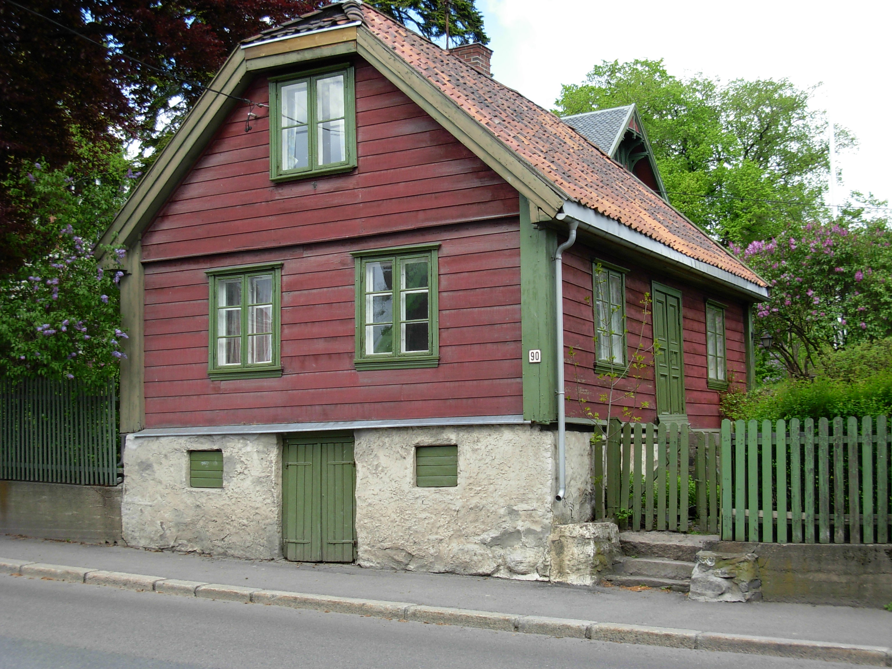 Tidligere Ullevålsveien 90B, Oslo. Nå omnummerert til 100.